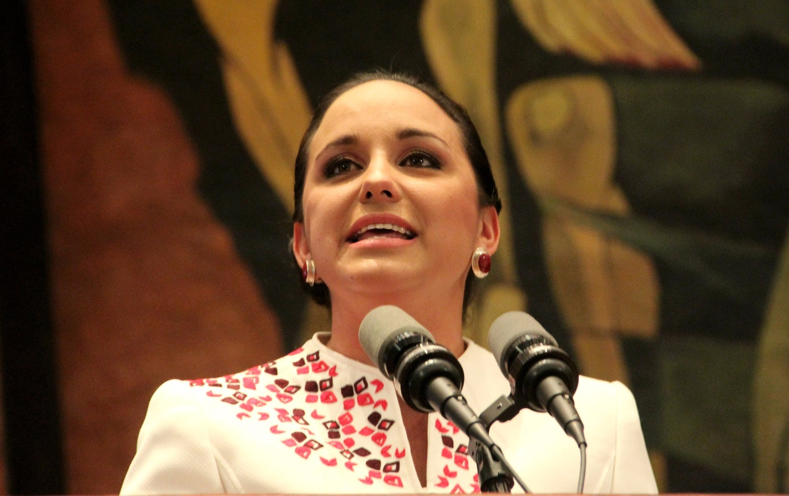 Gabriela Rivadeneira Burbano, presidenta de la Asamblea Nacional de Ecuador